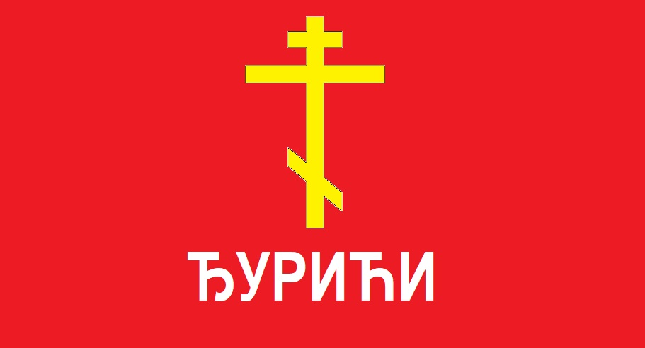 Застава